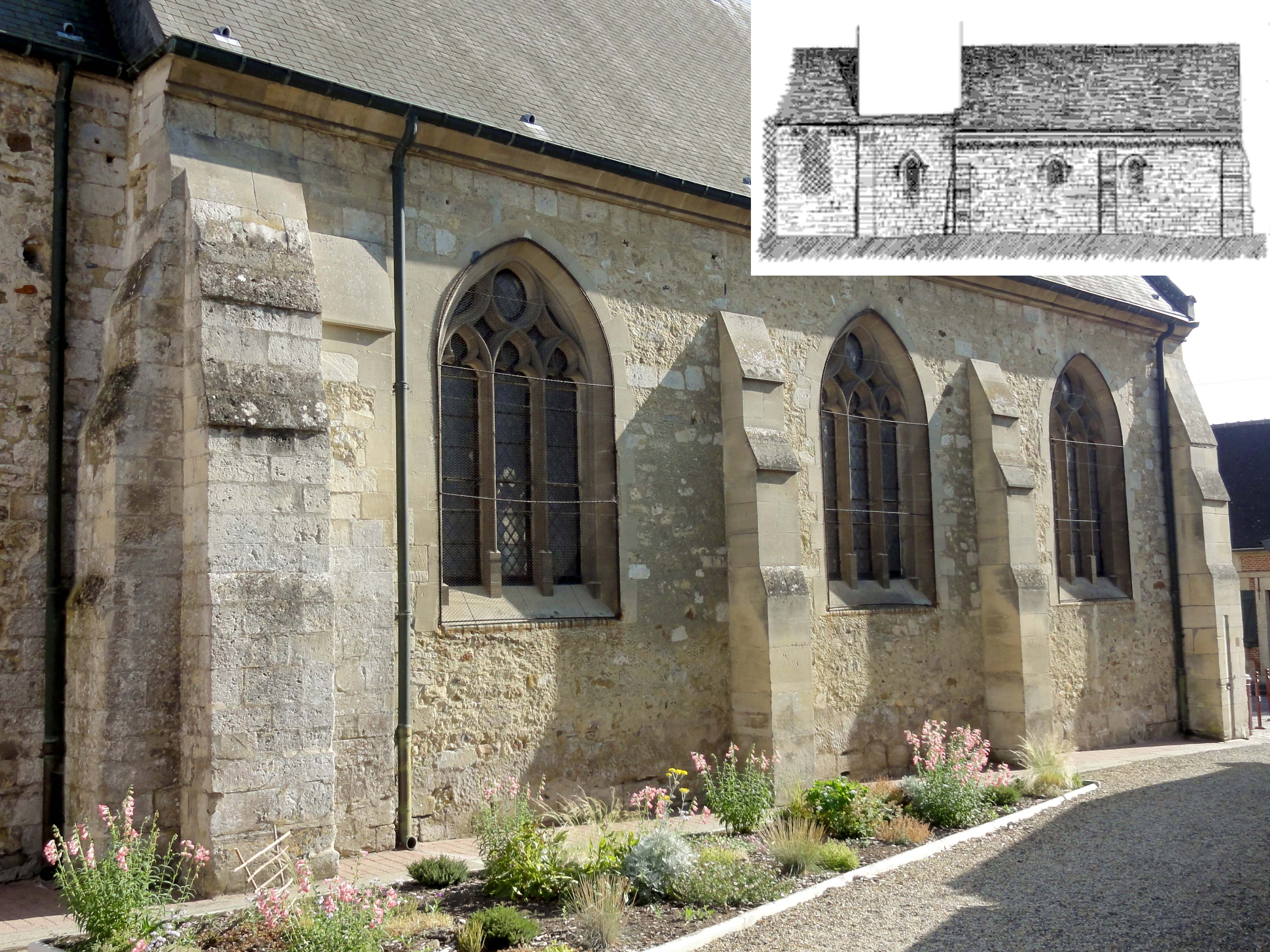 Flanc nord de la nef - situation en 2015 et pendant les années 1840 (source : Eugène Joseph Woillez, Archéologie des monuments religieux de l'ancien Beauvoisis pendant la métamorphose romane, Paris, Derache, 1849, 492 p., Fitz-James planche I).